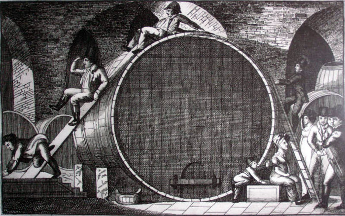 Tausendeimerfass im Keller des Stiftes Klosterneuburg